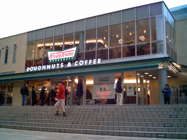 Krispy Kreme Doughnuts Japan